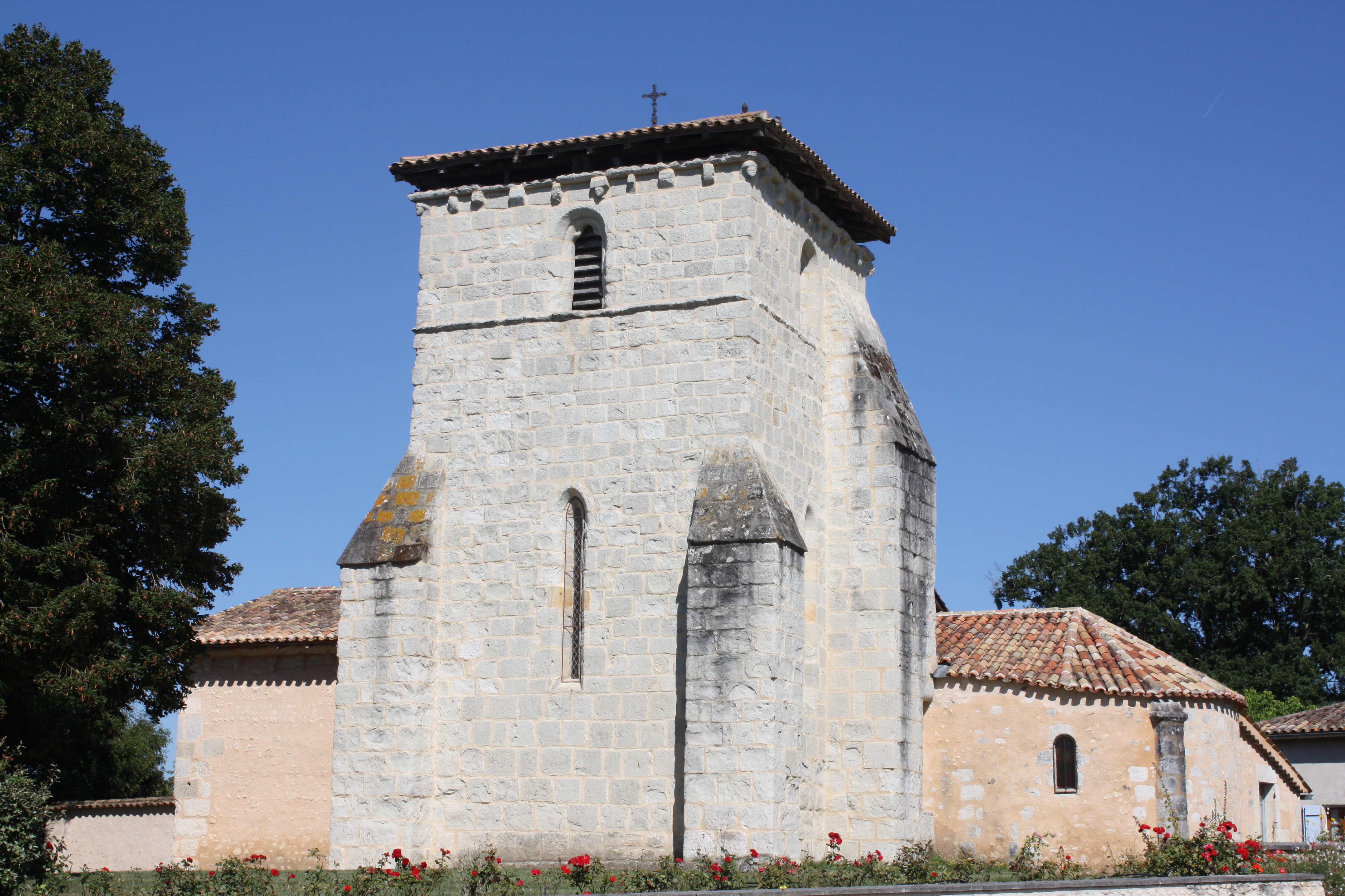 Église Saint-Pierre de Saint-Pierre-du-Palais .